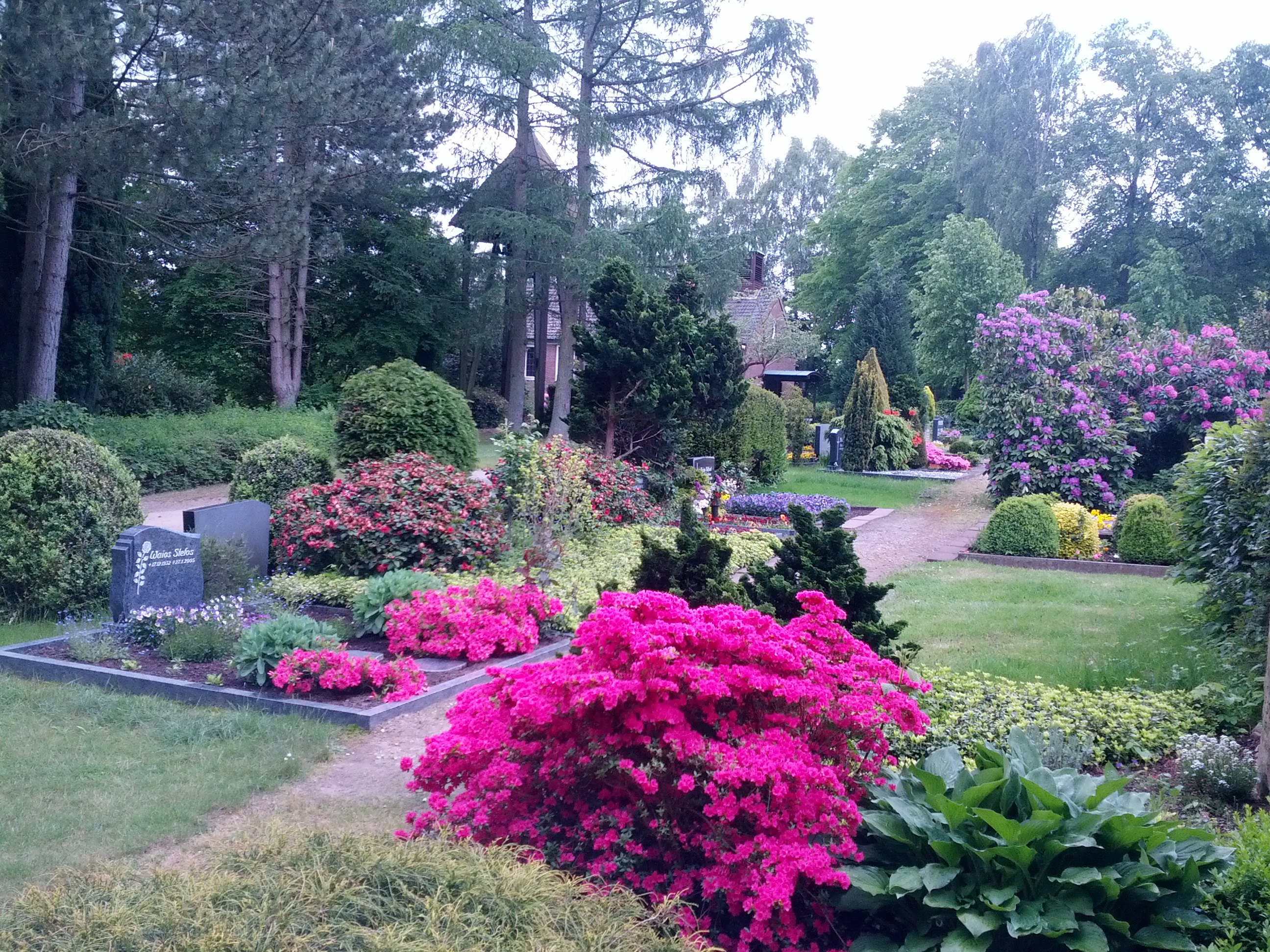 Gräver op’n Karkhoff von Hornborg (Waldkarkhoff)